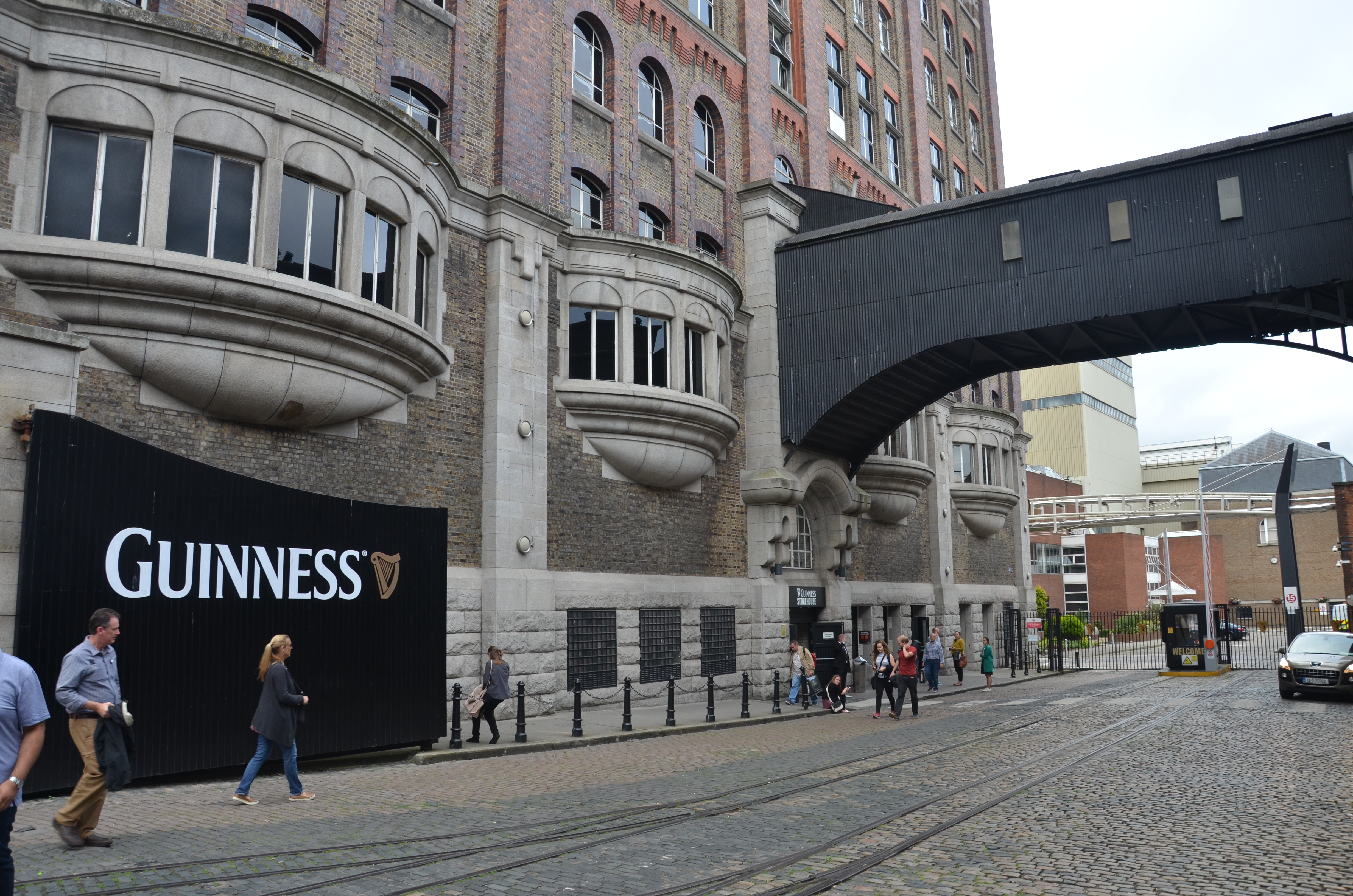 Guinness Storehouse in Dublin.